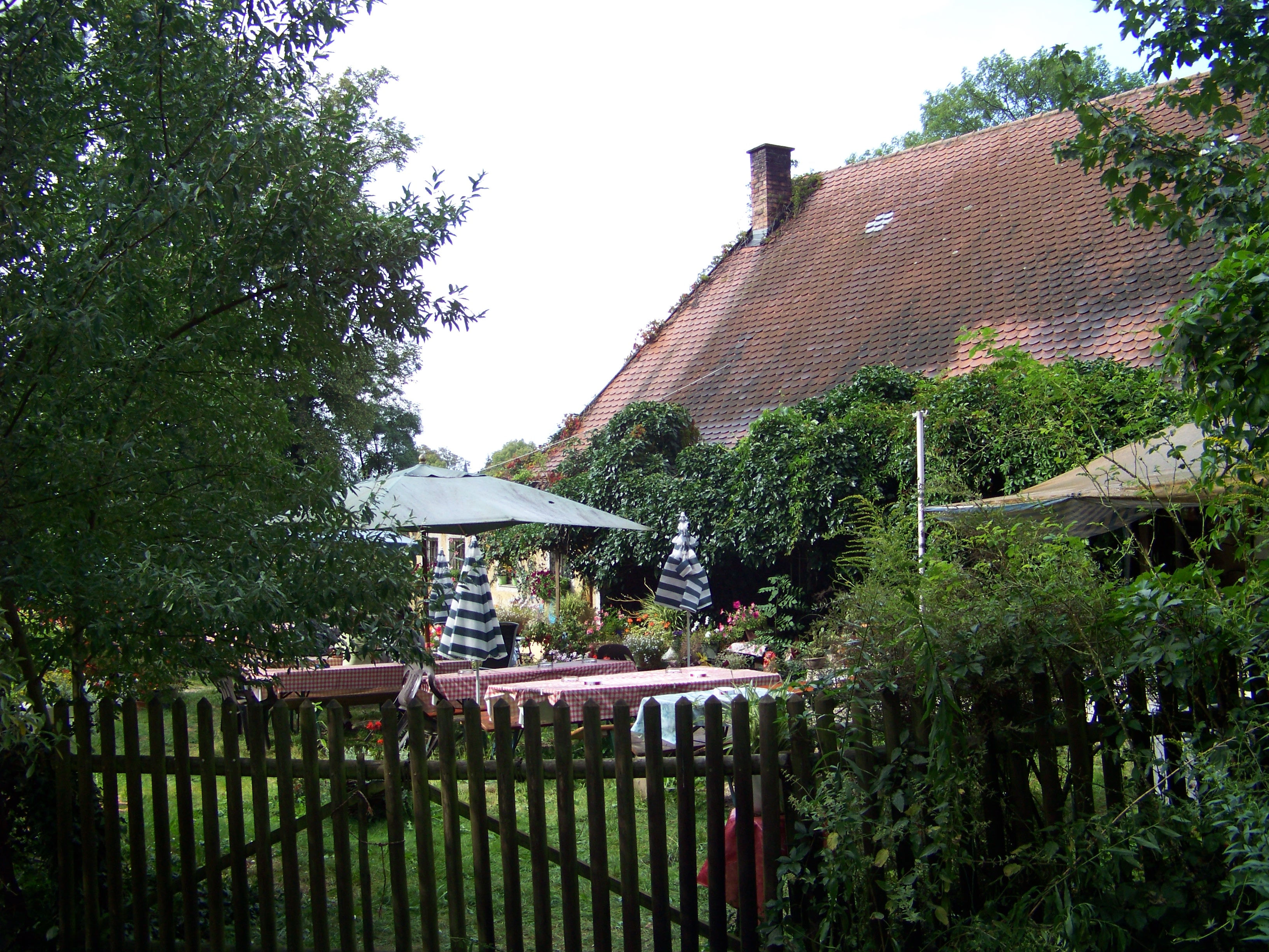 Sünching, Am Hart 21. Bis zum Herbst 2009 wurde hier noch eine ständige Gastronomie betrieben. Ein gemütlicher Biergarten mit reichem Blumenschmuck lud zur gemütlichen Einkehr ein. Die Wirtin wußte viel über diesen geschichtsträchtigen Ort zu erzählen. Das Wirtshaus befand sich im Walmdachbau über dem Eingang zum Kellerhaus.